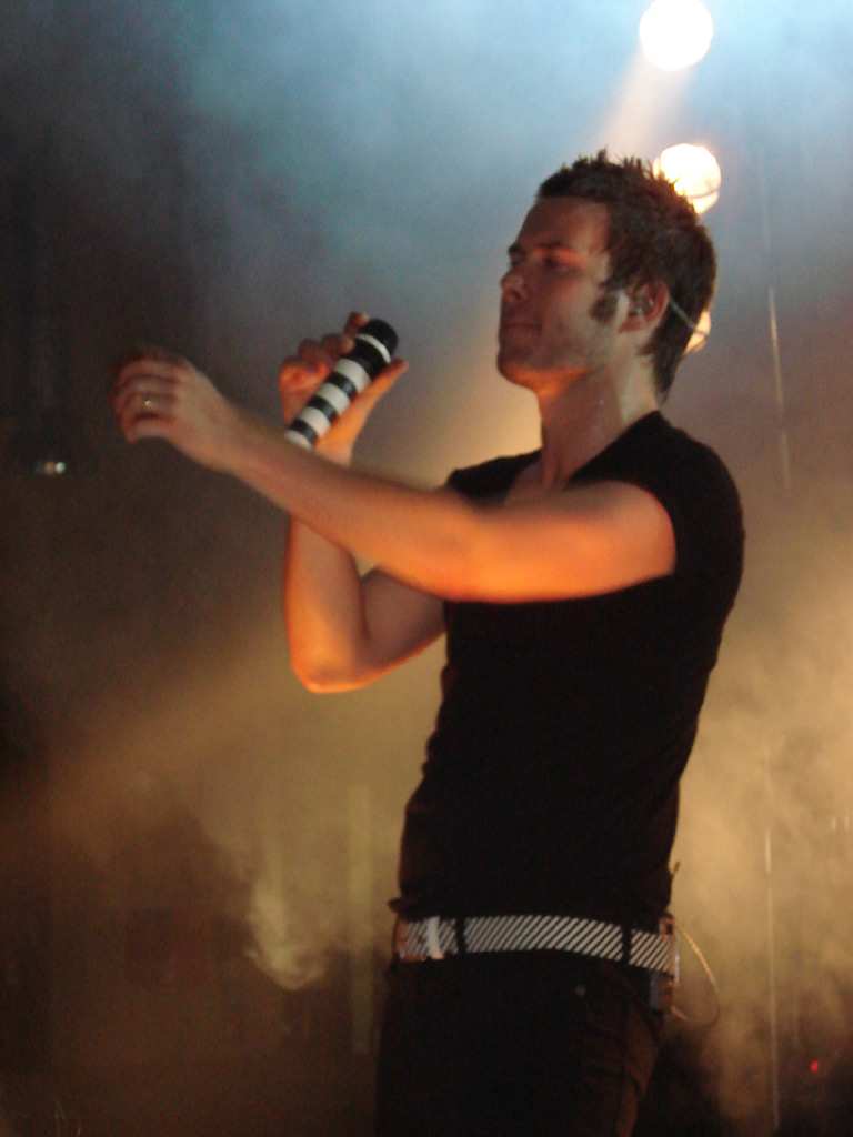 Dëst Bild weist de Frontmann vun der Grupp Revolverheld Johannes Strate (06. August 2007 an der Aaler Seeërei)